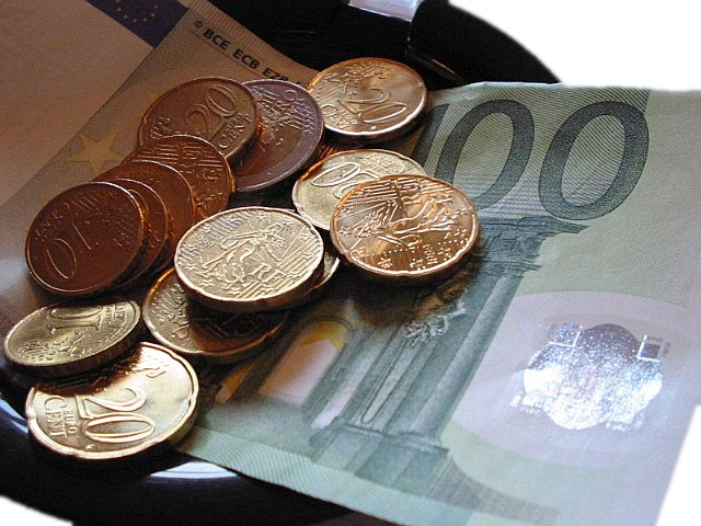 Quelques euros en paiement.